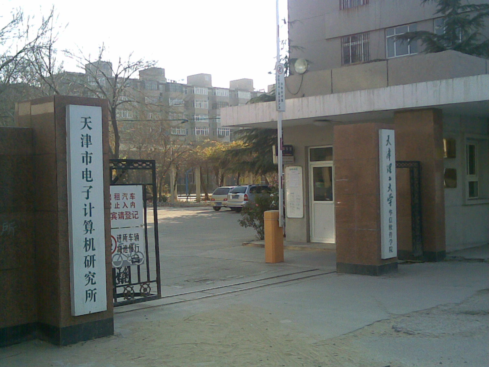 大门口